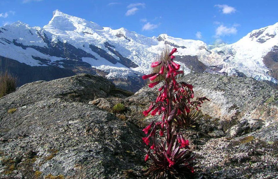 Hualcan